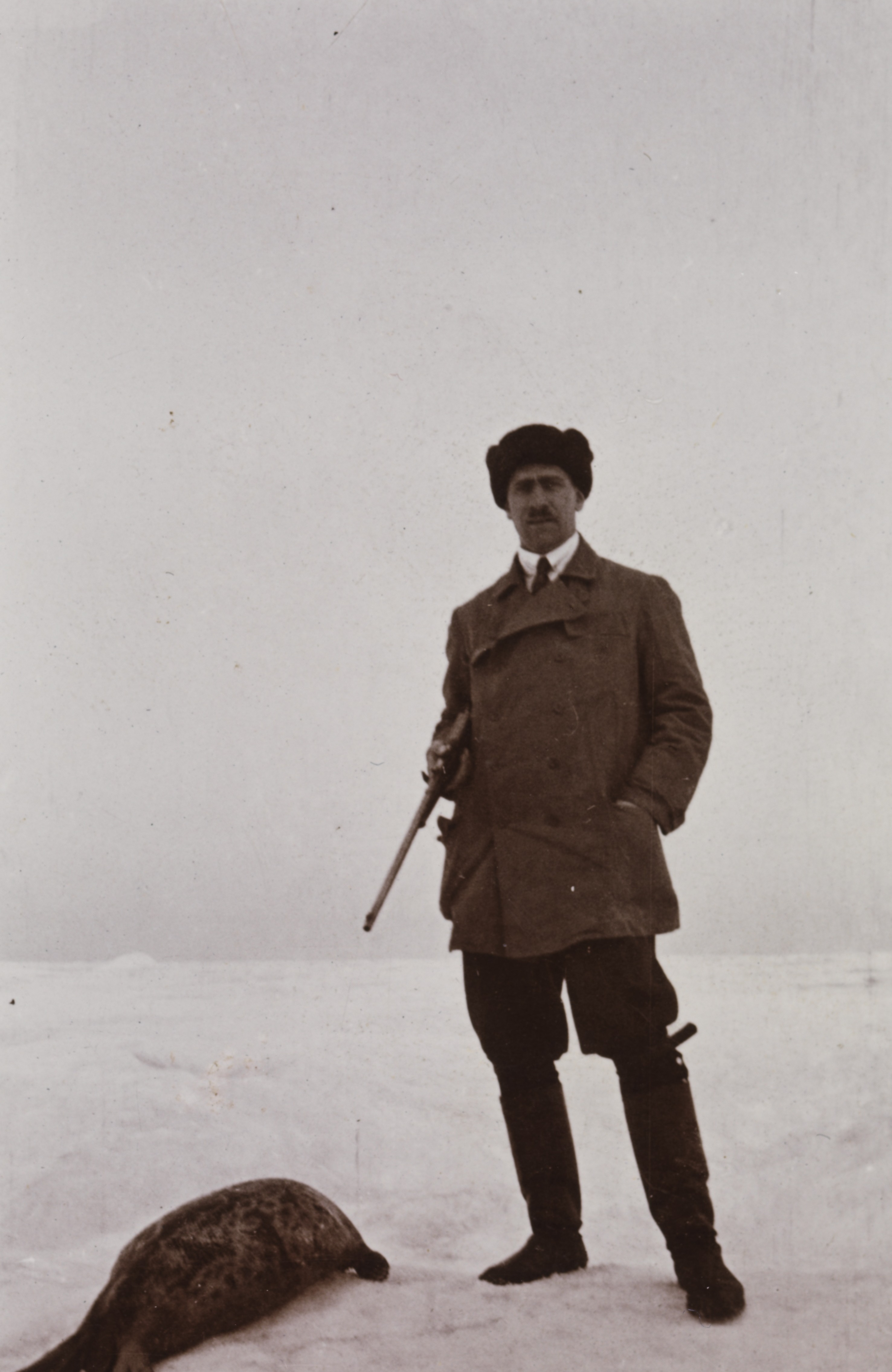 Jonas Lied ved en sel han nettopp hadde skutt på den faste isen utenfor Jamalkysten. Ett av bildene fra reisen til Sibir i perioden 2. august-26. oktober 1913. Fridtjof Nansen startet sin transsibirske reise med et handelsskip fra Oslo til Jenisej. Ferden gikk gjennom deler av nordøstpassasjen som skulle åpne for en kortere handelsforbindelse mellom Vest Europa og Det Fjerne Østen. Depicted person: Lied, Jonas (1881-) Depicted place: Karahavet